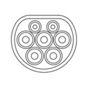 Presa tipo 2